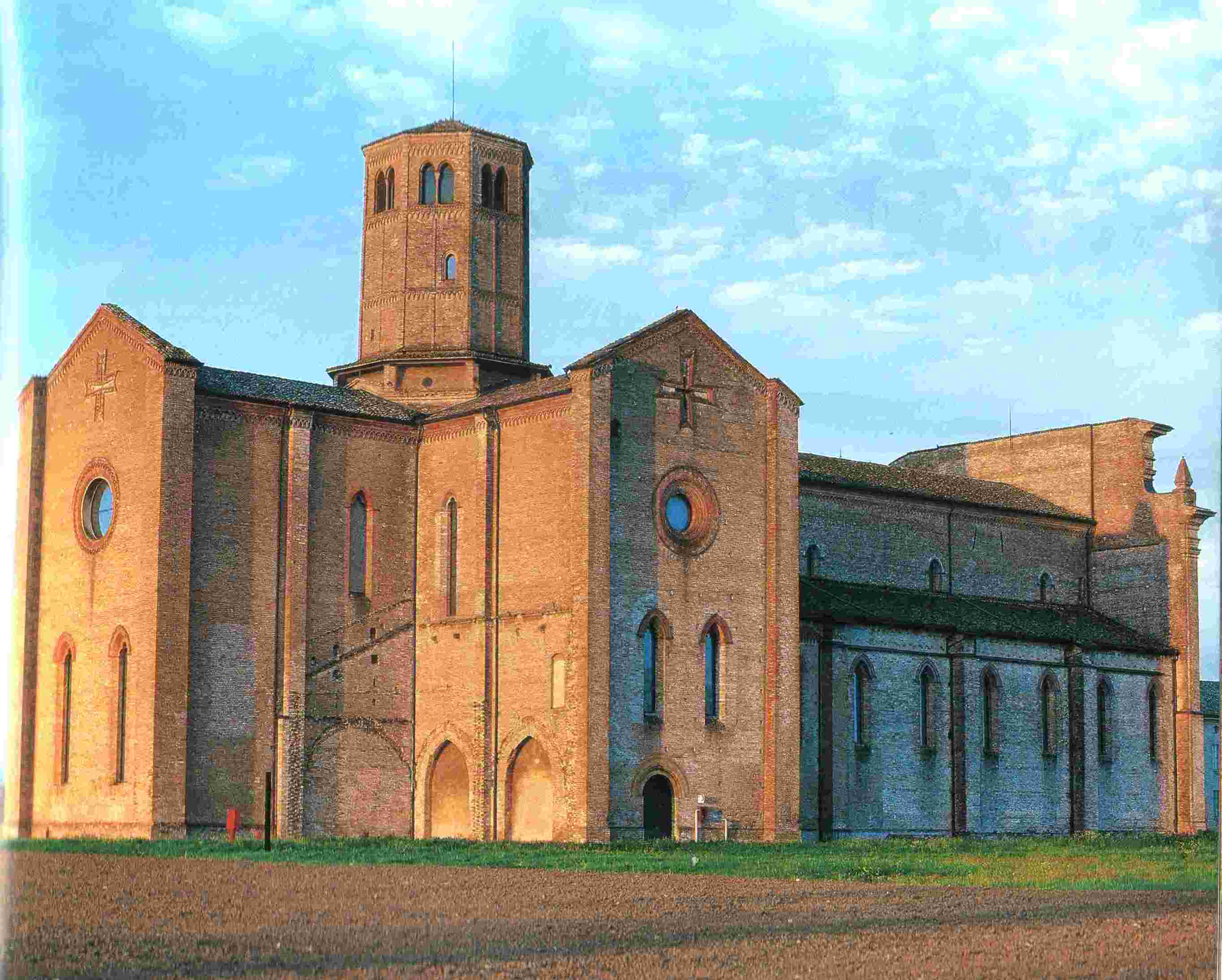 L'abbazia di Valserena a Paradigna (Parma), detta "Certosa di Paradigna".